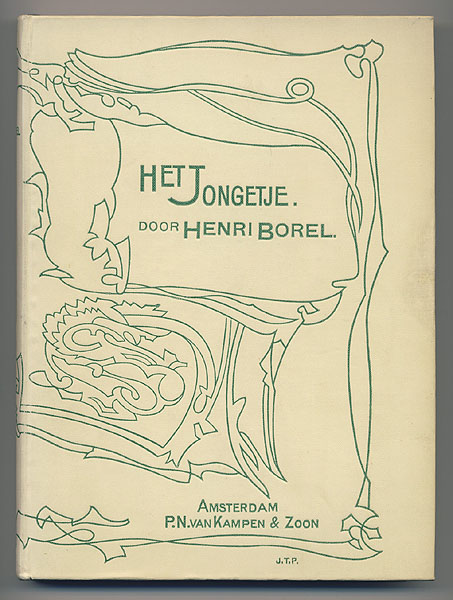 Boekomslag: Het Jongetje. 4e druk 1912. Auteur: H. Borel. Bandontwerp: J. Thorn Prikker. Uitgeverij: Van Kampen & Zoon